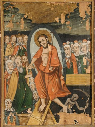 Уваскрэсенне – Сашэсце ў пекла. XVІIІ ст. З в. Альгомель Брэсцкай вобл. Музей старажытнабеларускай культуры НАН РБ